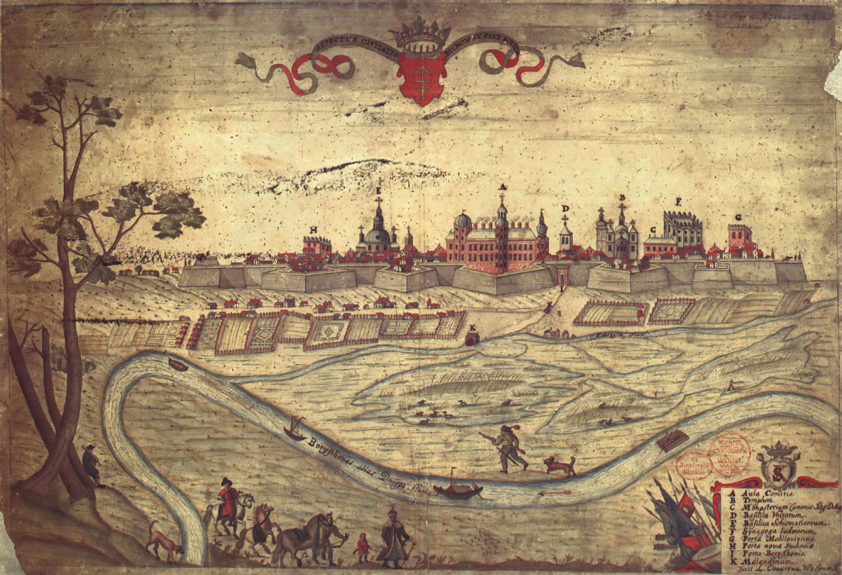 Беларуская (тарашкевіца): Быхаў (Bychaŭ). Панарама места